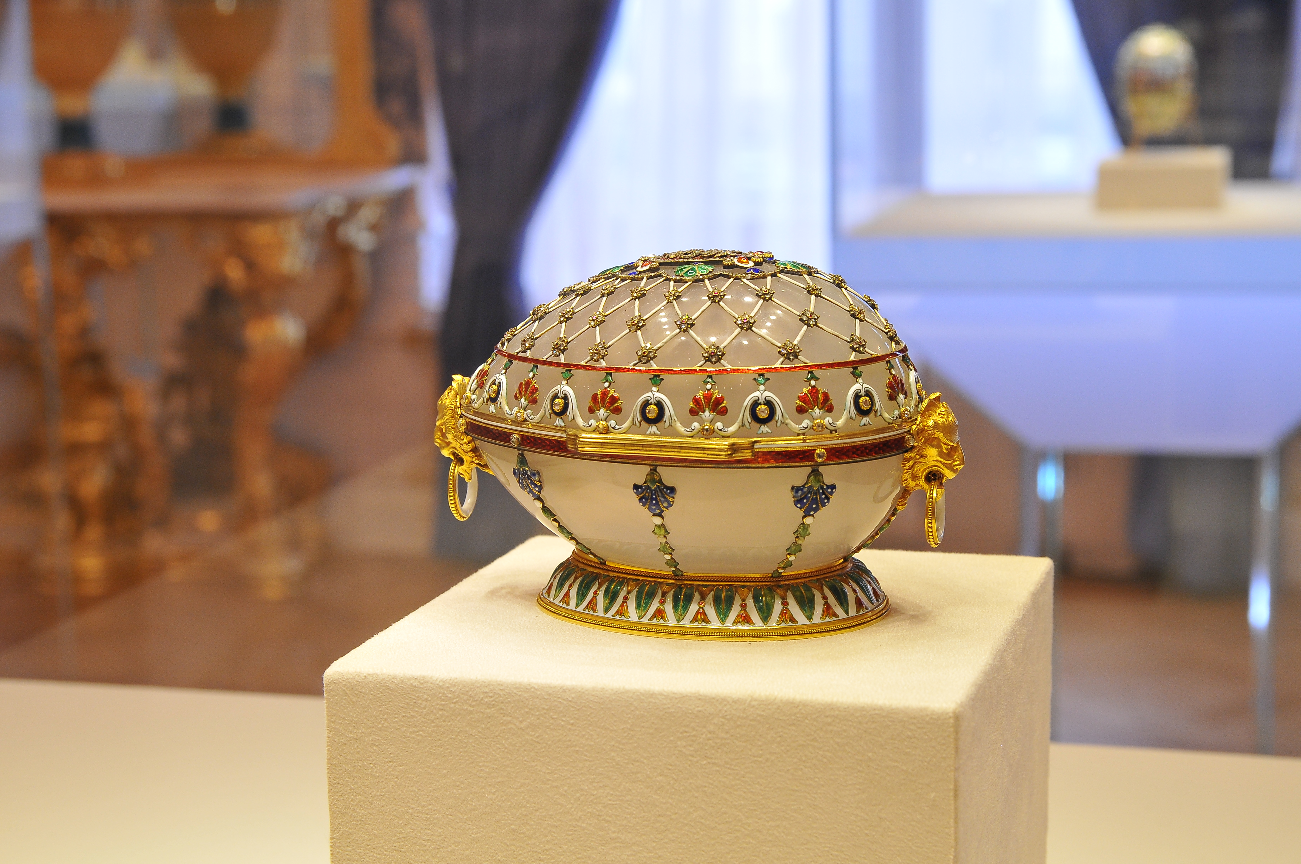 Императорское пасхальное яйцо-шкатулка "Ренессанс из коллекции Музея Фаберже в Санкт-Петербурге".